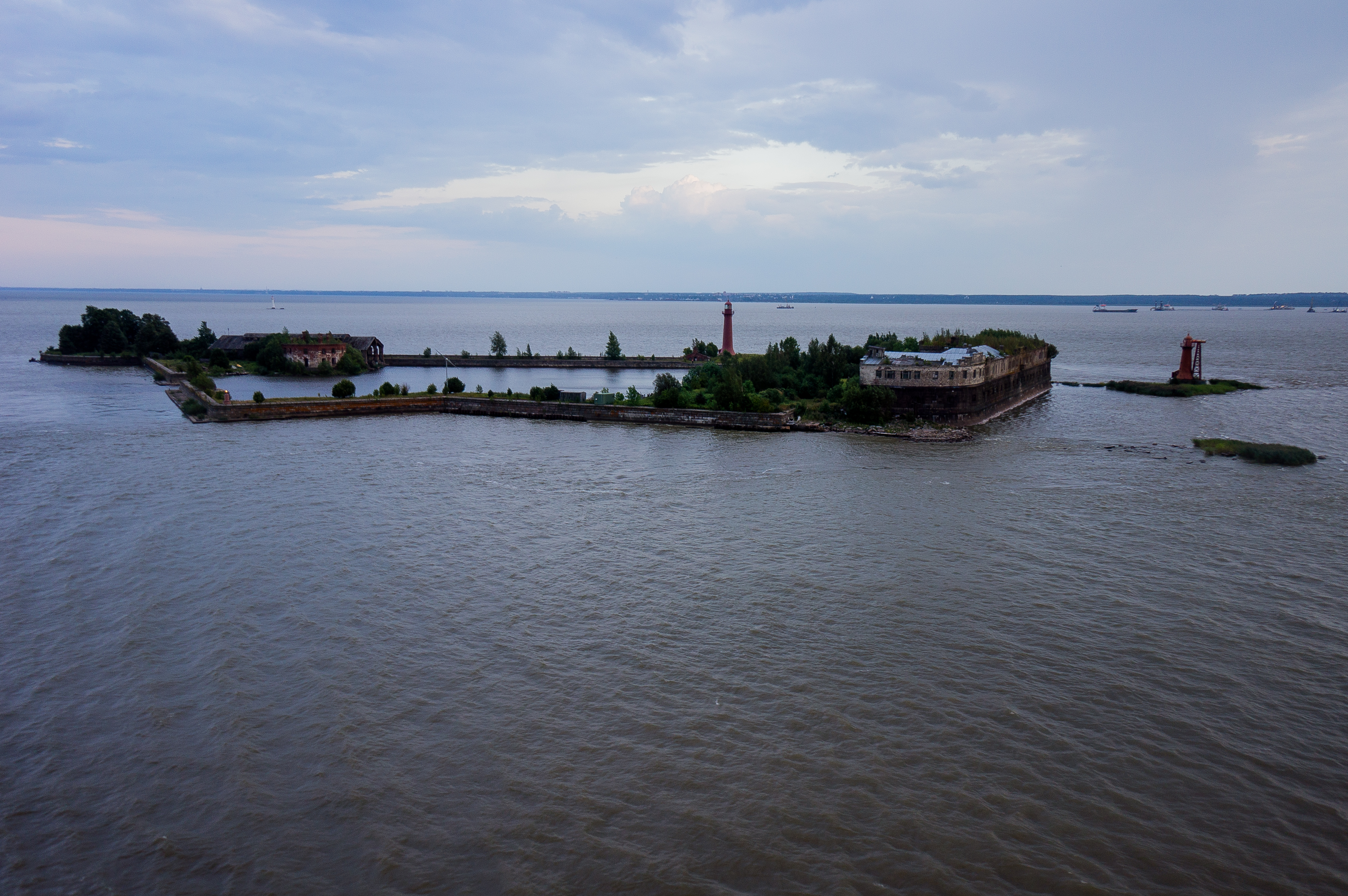 Форт Кроншлот: Финский залив, южный фарватер, Кронштадт, Кронштадтский район, Санкт-Петербург